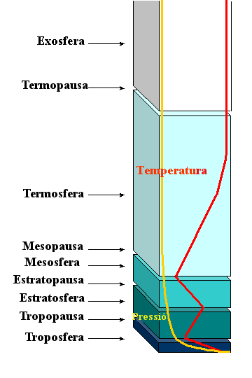 Treball derivatiu de l'estructura de l'atmosfera.